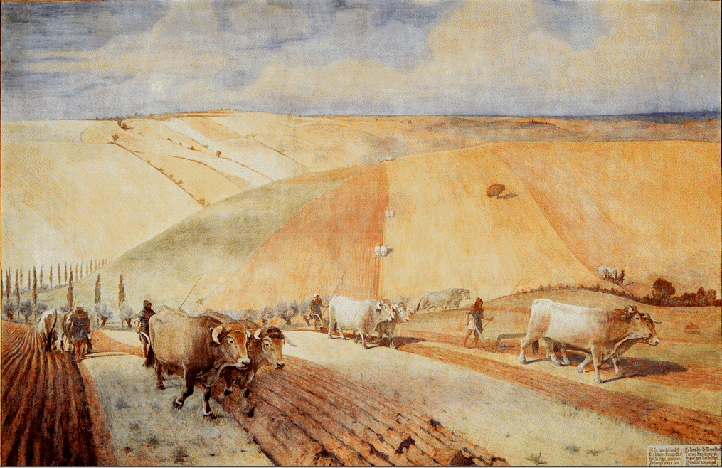 Evocation des labours dans les collines du Lauragais. Jean-Paul Laurens est né à Fourquevaux dans le Lauragais ; c'est une des rares voire la seule représentation qu'il donne de son pays natal.